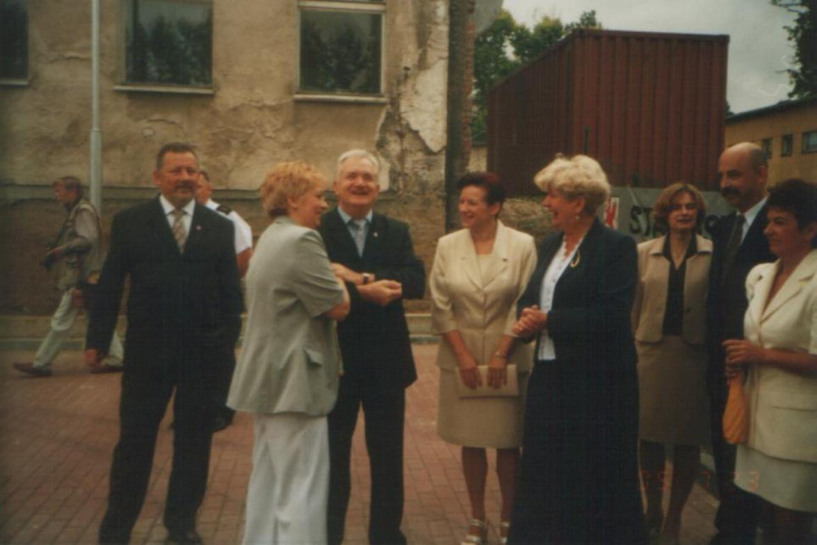 Szpital, 2005 r. Były dyrektor dr Paweł Zienkiewicz (trzeci od lewej)